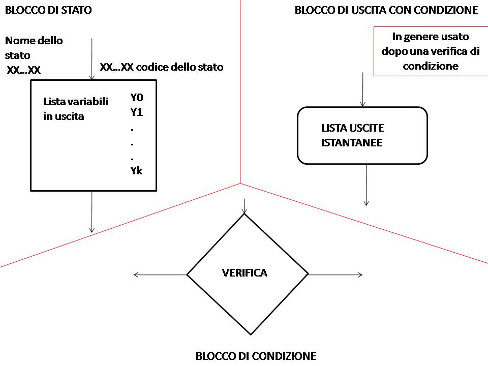 blocchi di una ASM